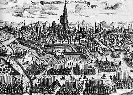 Les troupes françaises avant de Strasbourg. Septembre 1681